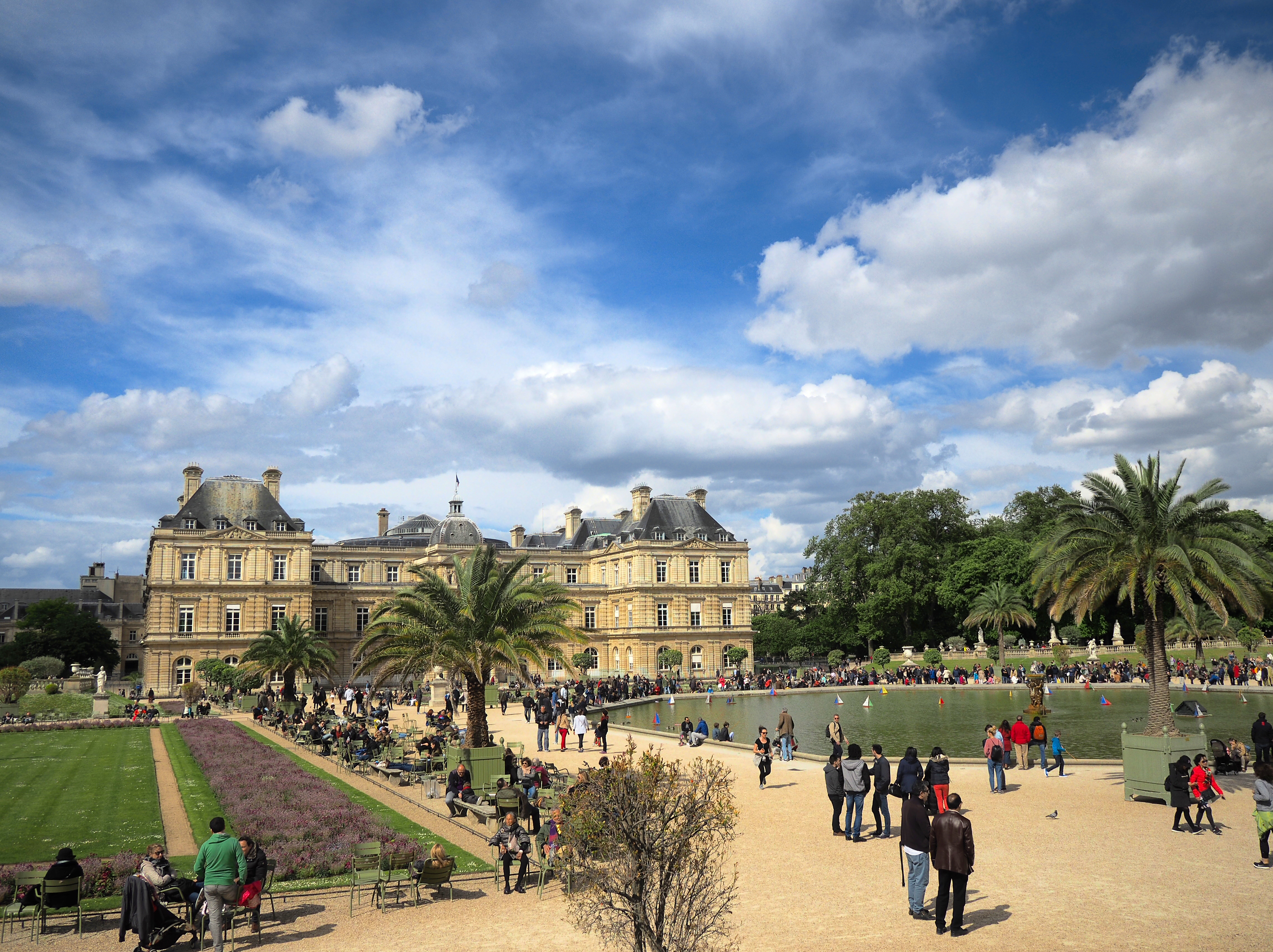 Jardin du Luxembourg